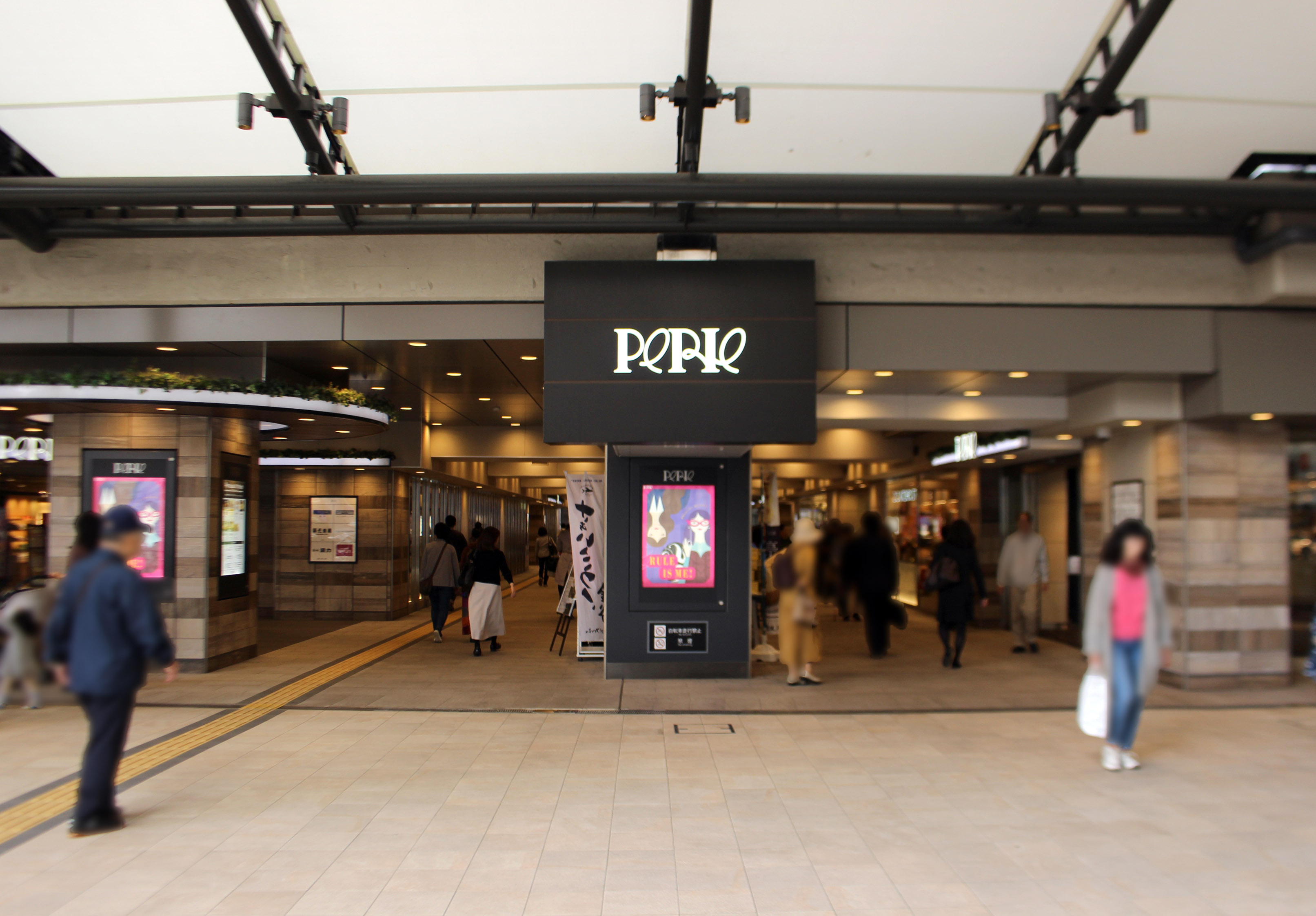 ペリエ千葉 千葉駅東口より千葉中央駅・そごう千葉店方面の出入口